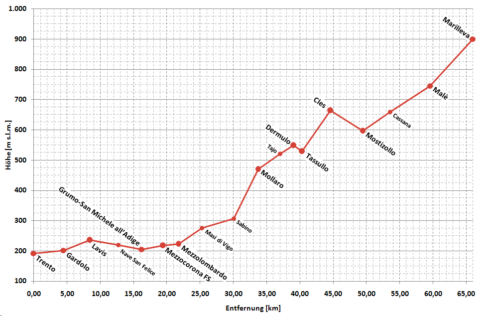 vereinfachtes Höhenprofil der Bahnstrecke Trento-Marilleva